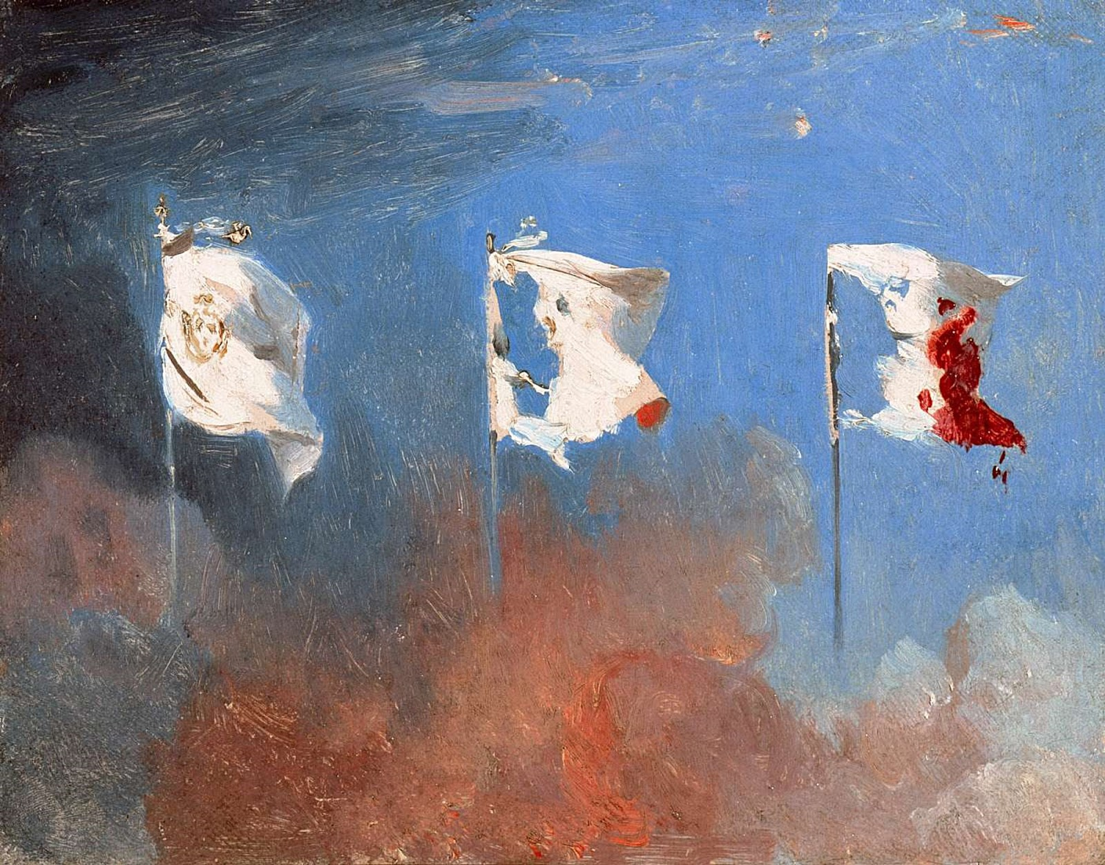 sketch